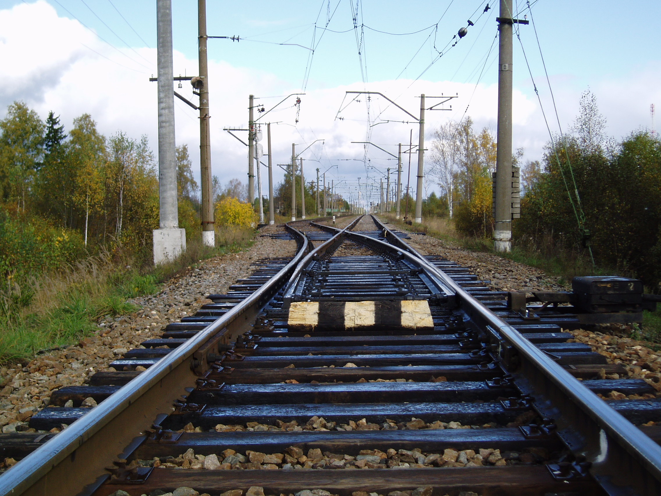 Вид на въезд на станцию «Конаковский мох» (поселок Второе Моховое) со стороны Москвы.